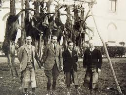 Montería Real en tiempos de Alfonso XIII.